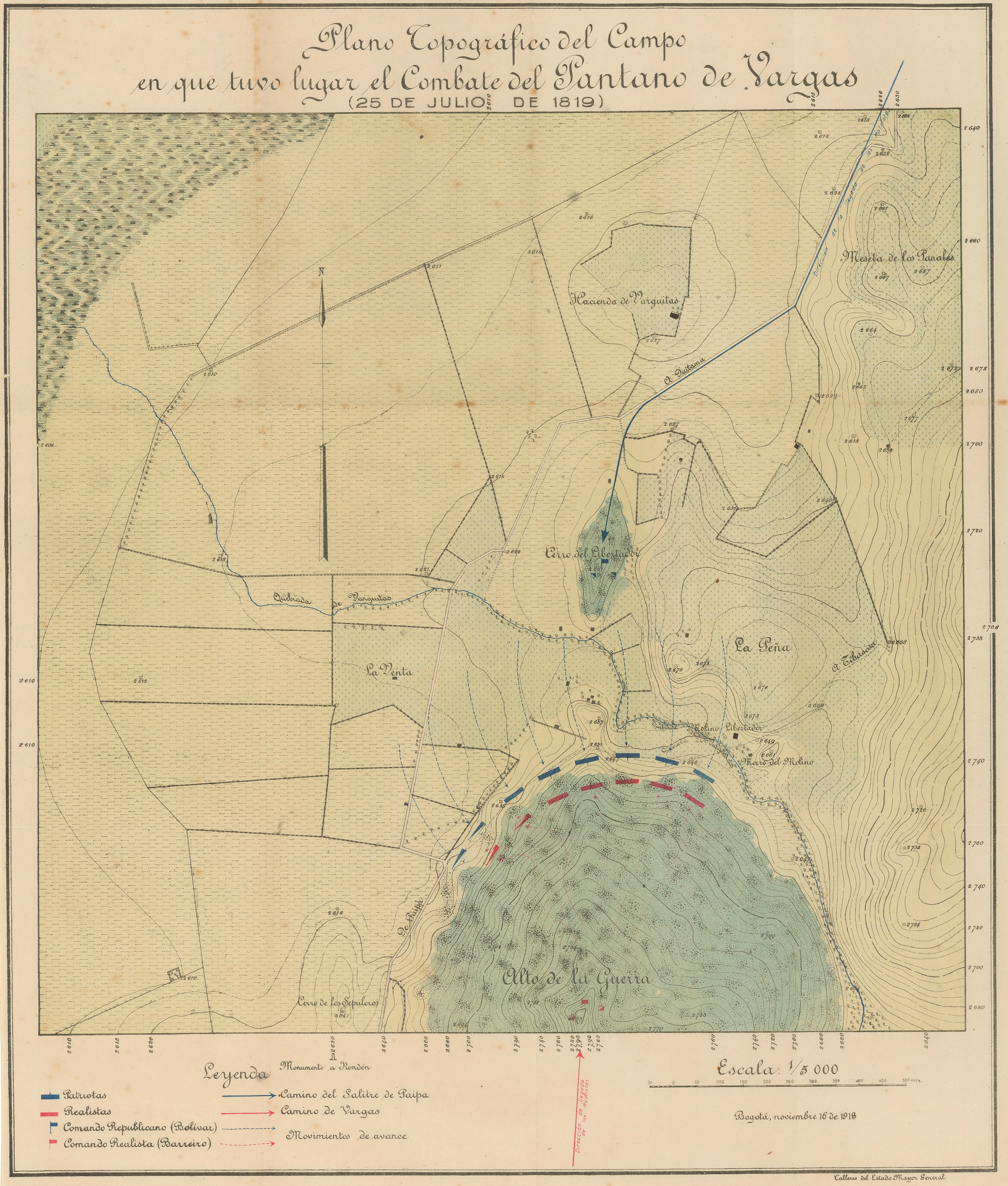 Carte topographie du champ de bataille lors de la bataille du Pantano de Vargas (25 juillet 1819)